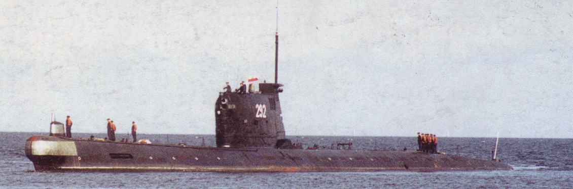 ORP Wilk